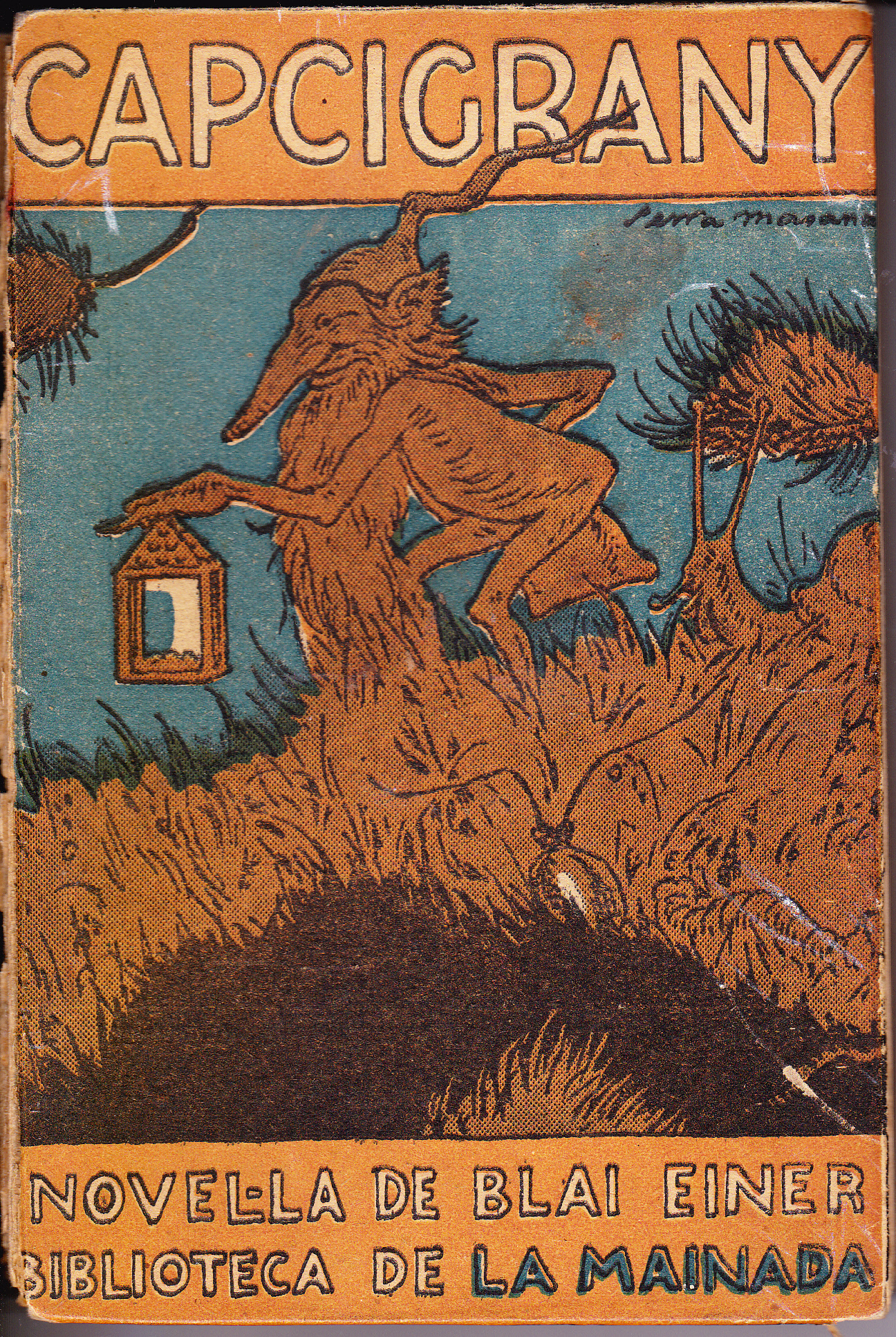 Coberta de l'edició en fulletó de la revista La Mainada (1925)